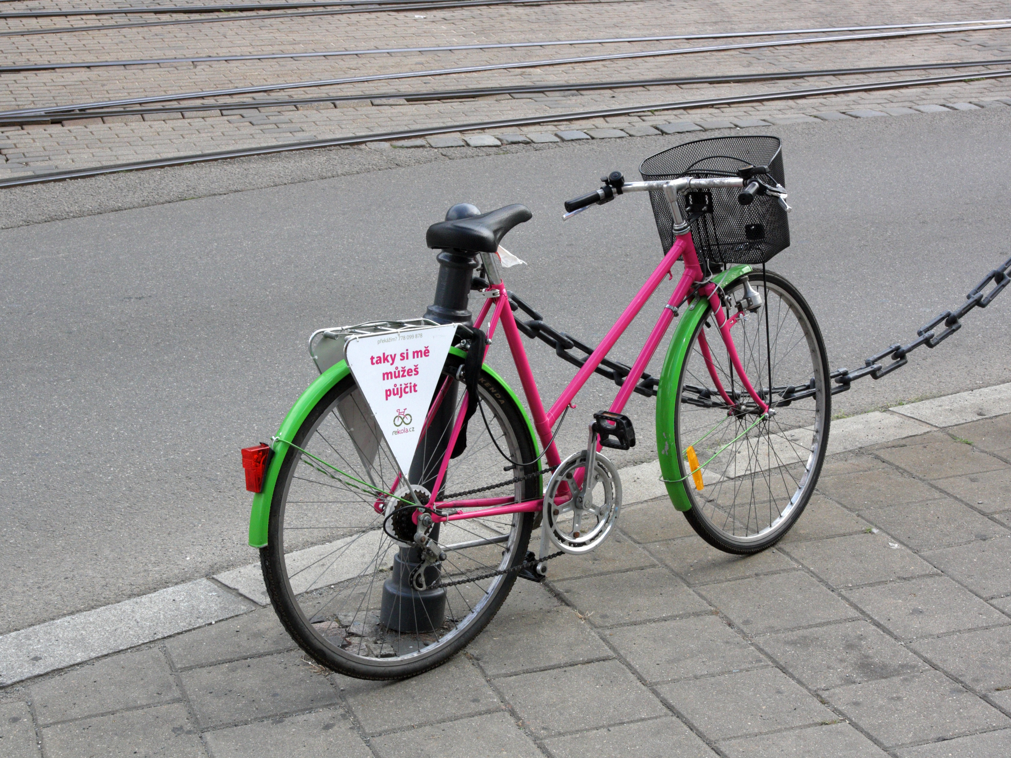 Brno - ul. Nádražní, kolo projektu Rekola.